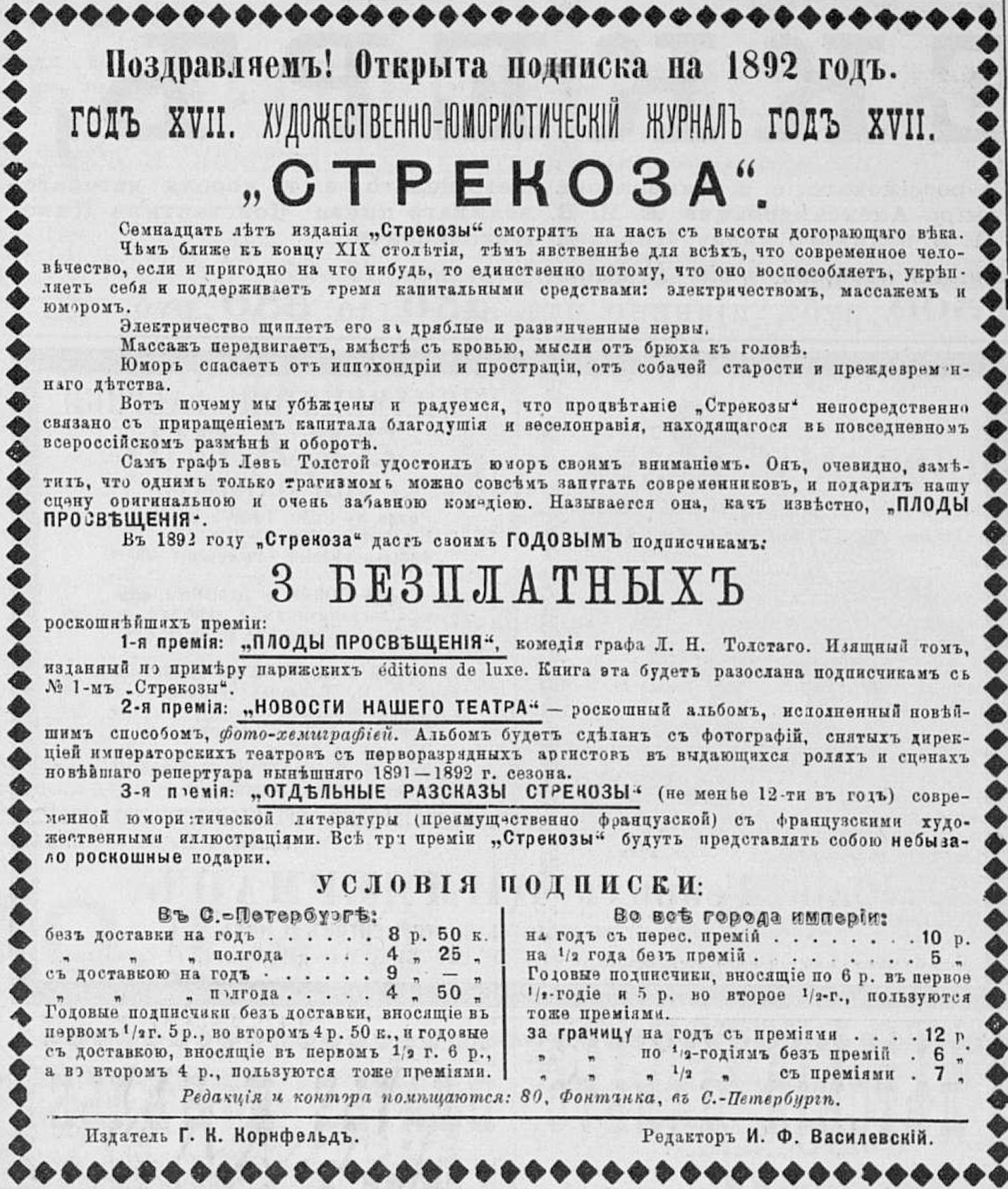 Реклама журнала Стрекоза, 1891 год